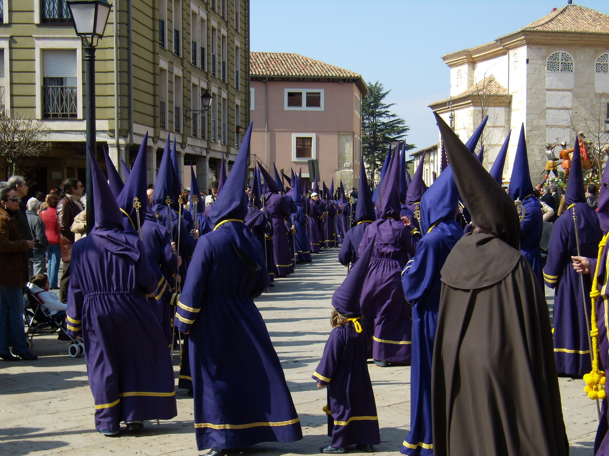 Procesión de los Pasos, Viernes Santo. Semana Santa de Palencia.